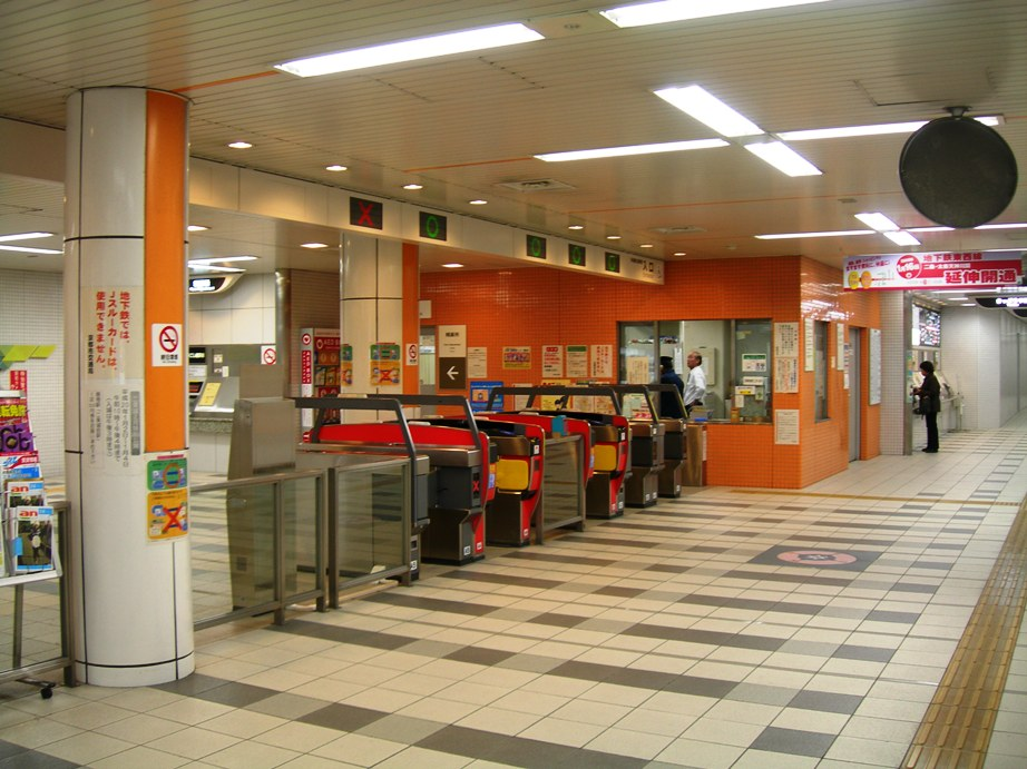 京都市営地下鉄東西線二条駅改札口